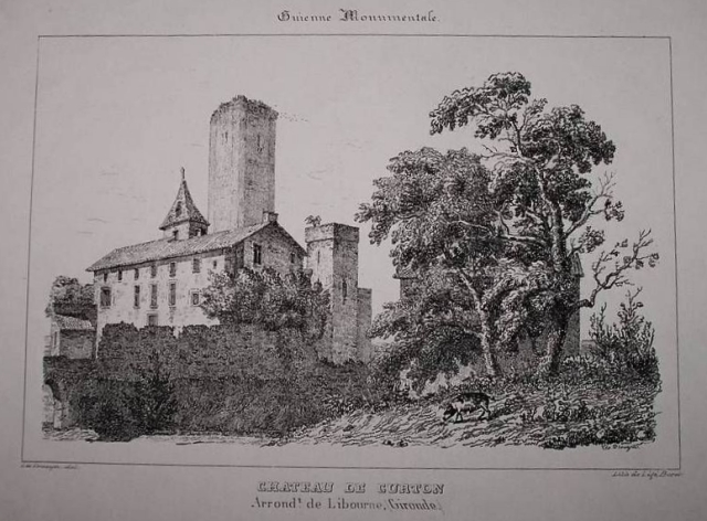 Chateau de Curton